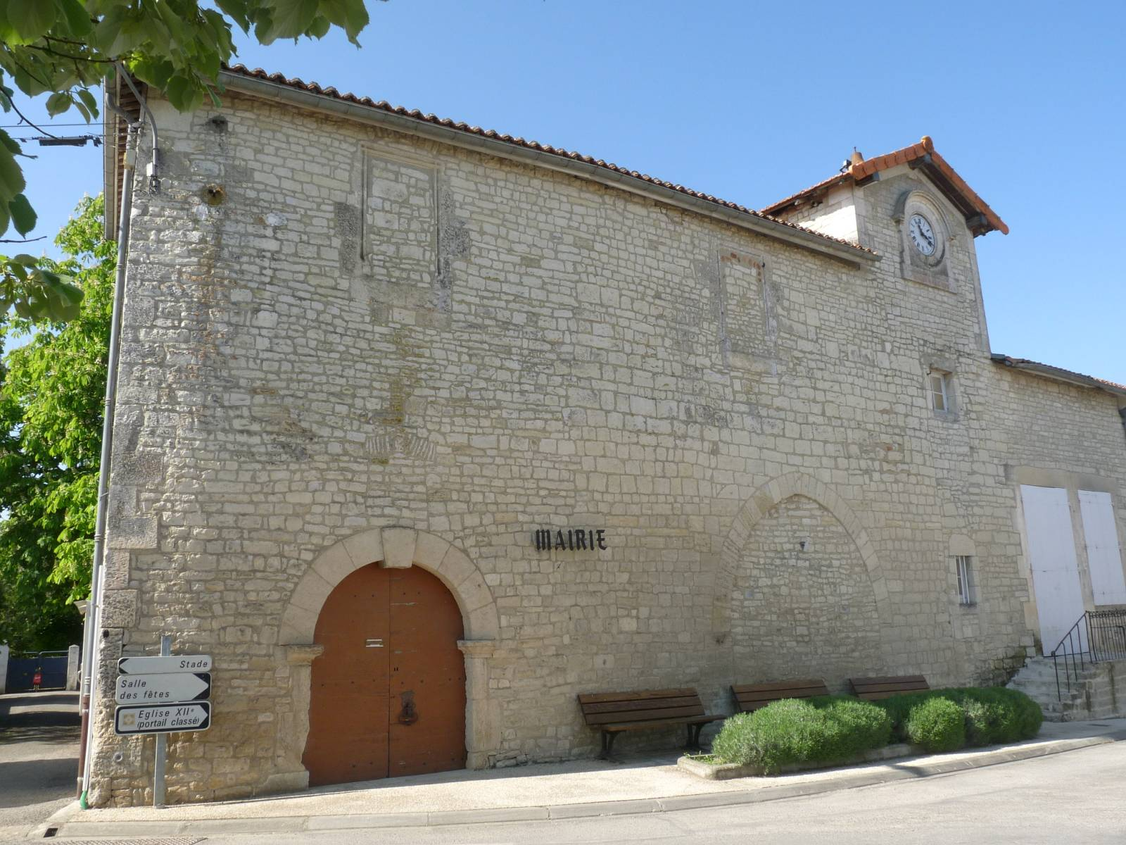 Mairie de Villognon, Charente, France